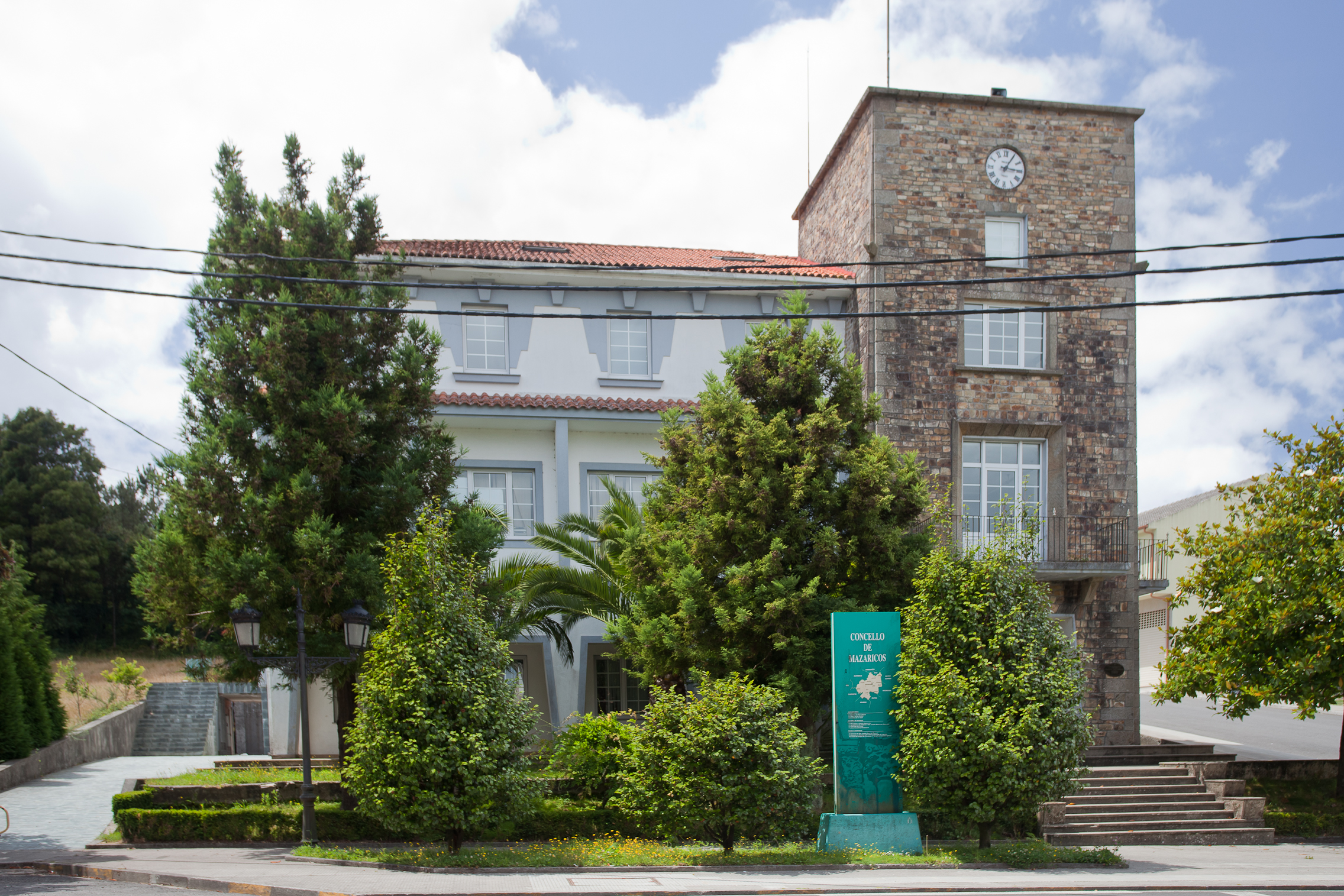 Casa do concello de Mazaricos, Galiza